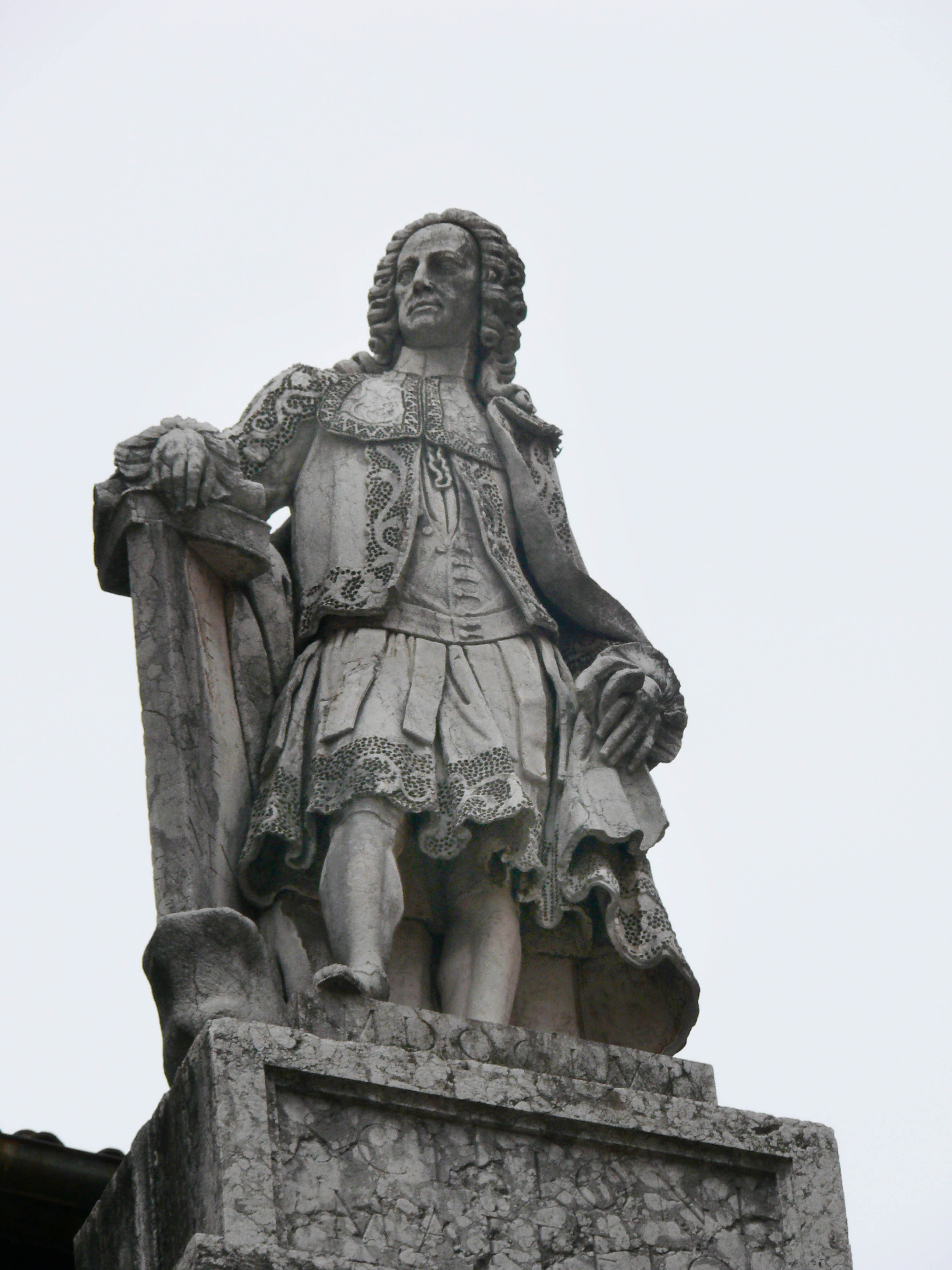 Scipione Maffei - statua marmorea posta in Piazza dei Signori a Verona